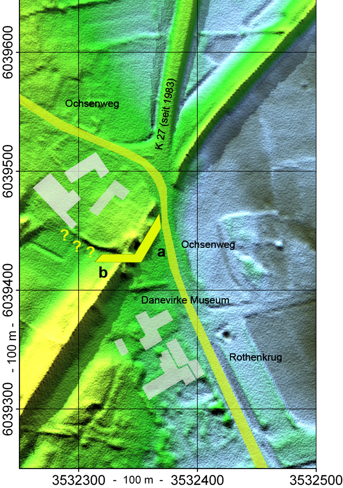 Kartierung eines Ausgrabungsbefundes in eine 3d-Karte